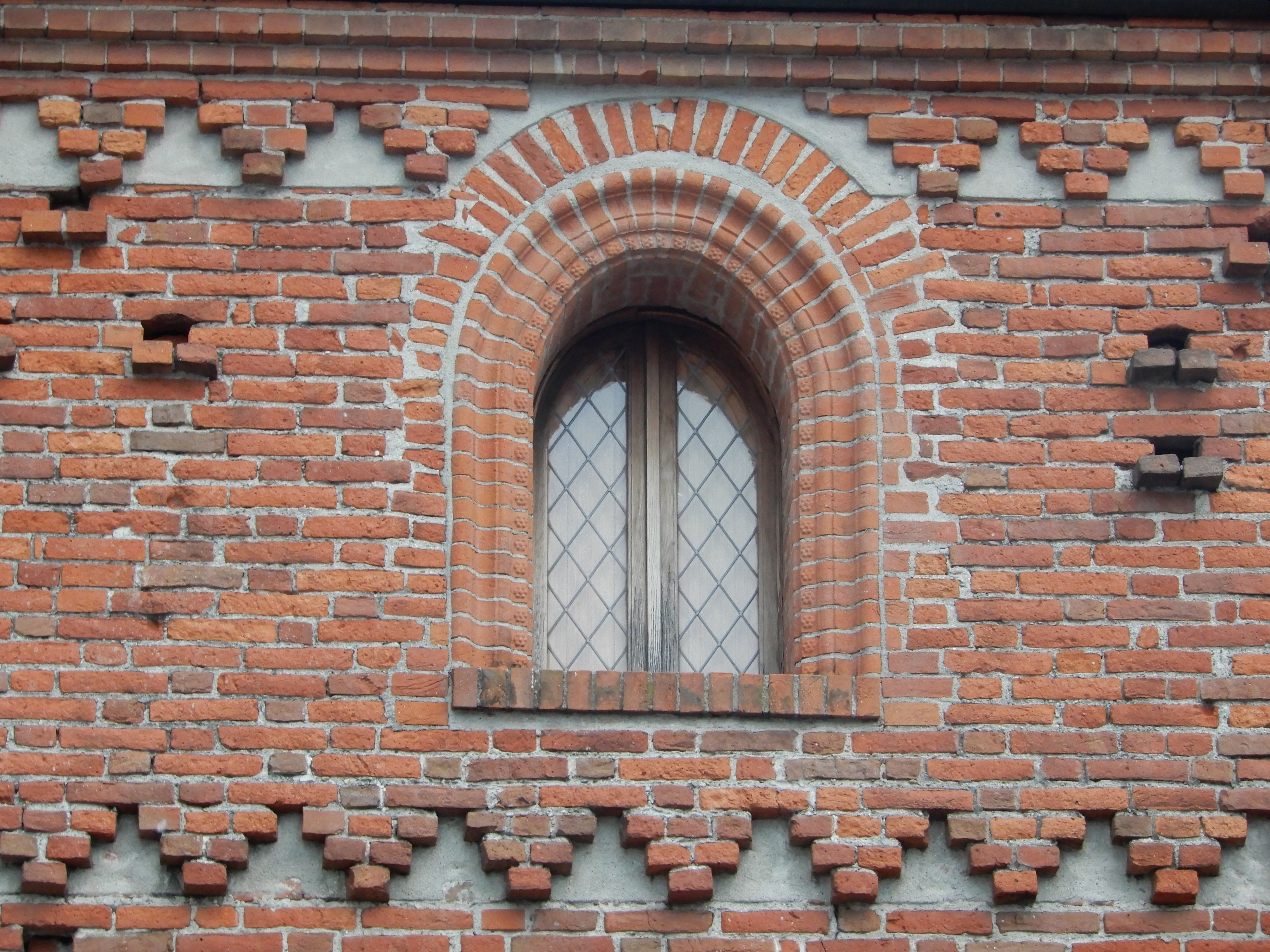 Finestra al secondo piano del Palazzo delle Credenza di Ivrea